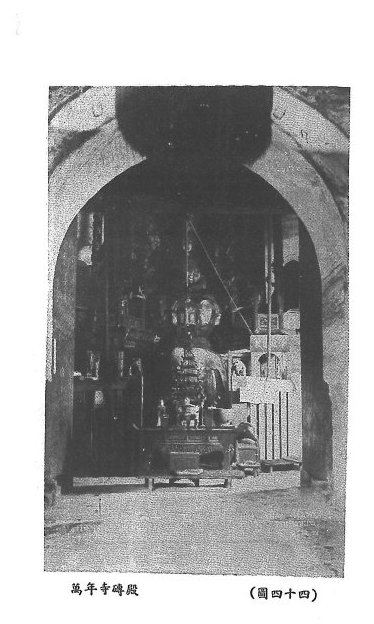 峨眉山老照片